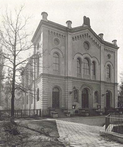 Synagogue in Linz - Austria(1877-1938)